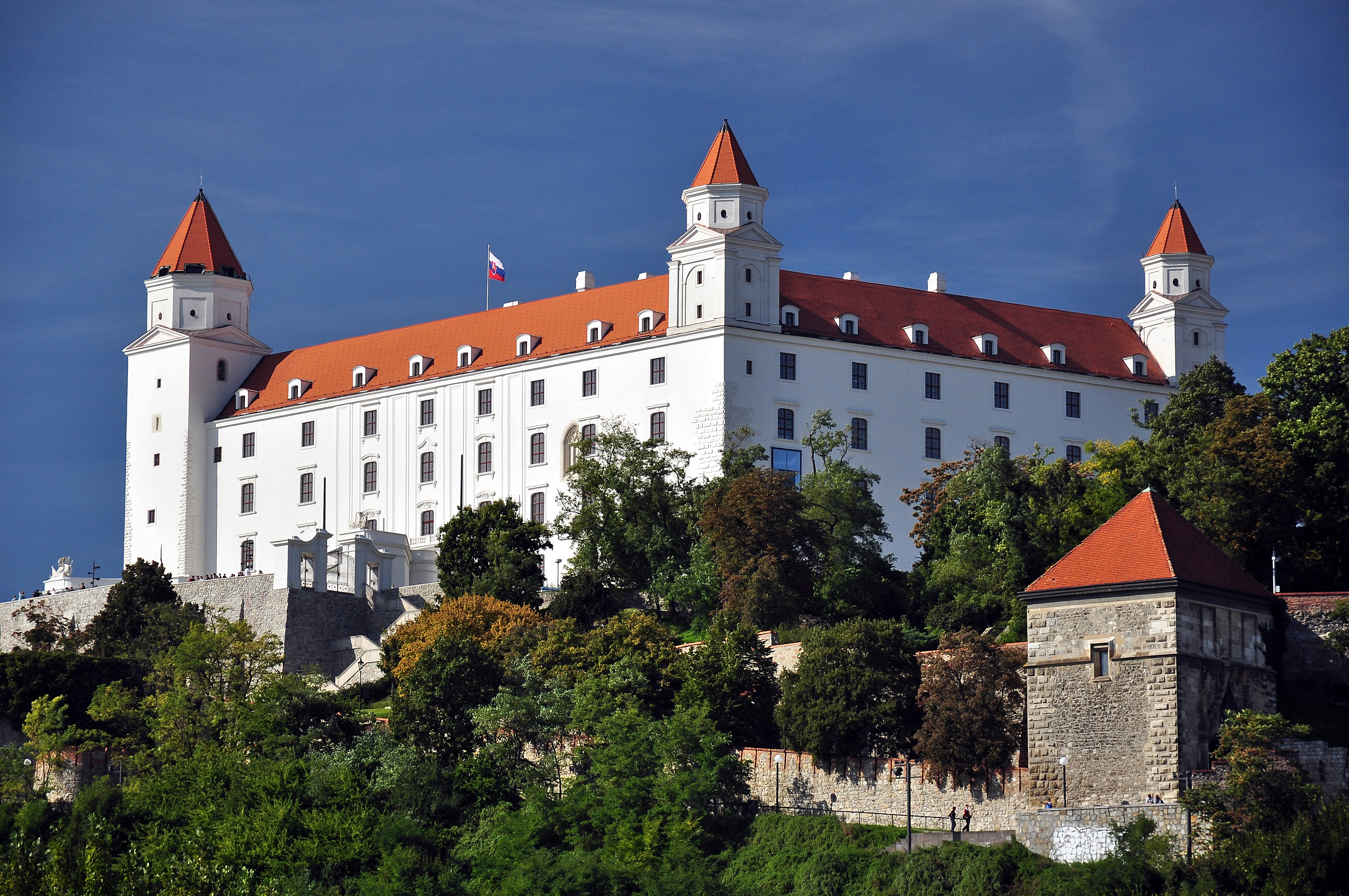 Bratislava, hrad, Slovensko